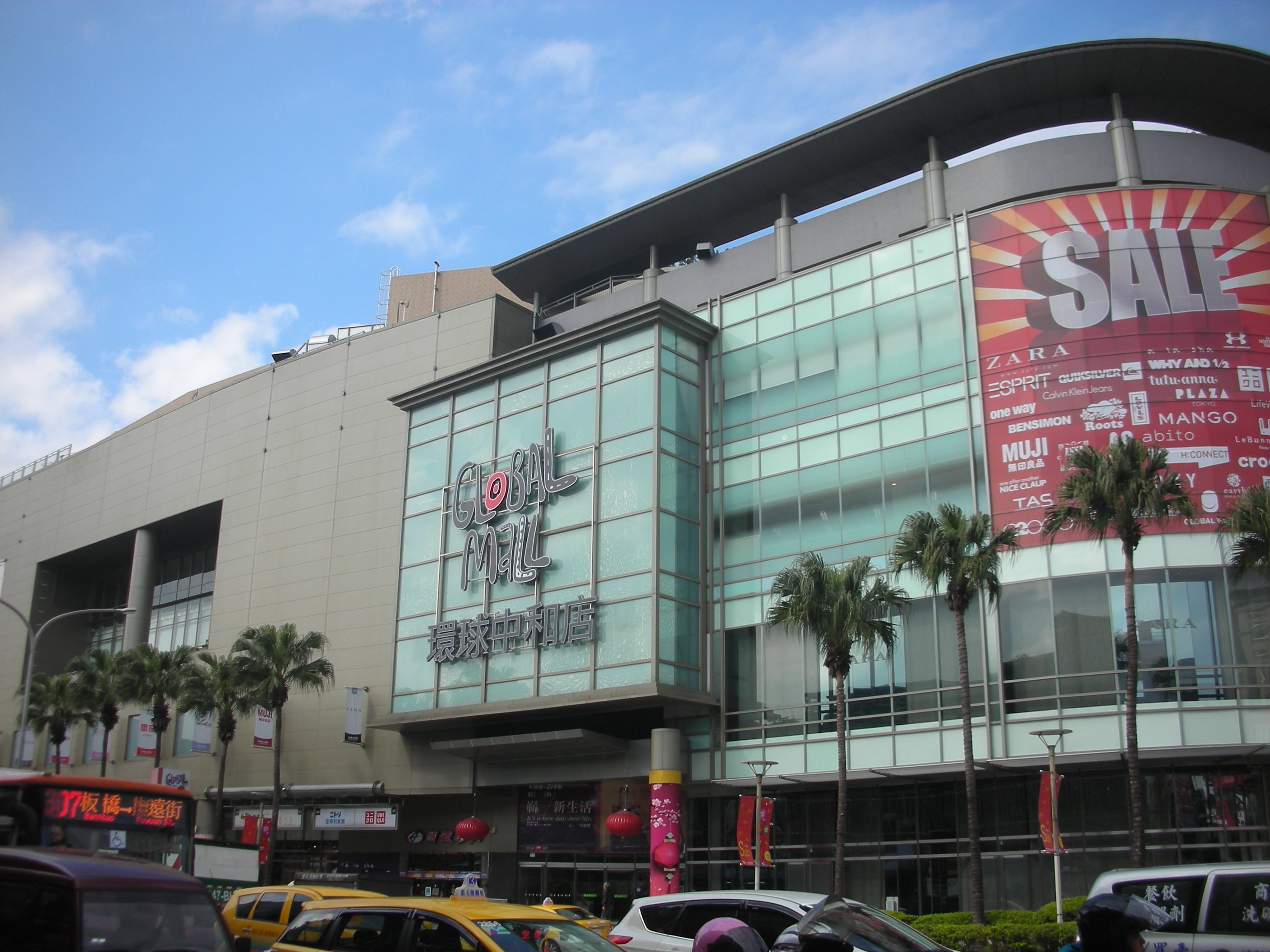 中文（台灣）: 環球購物中心中和店。